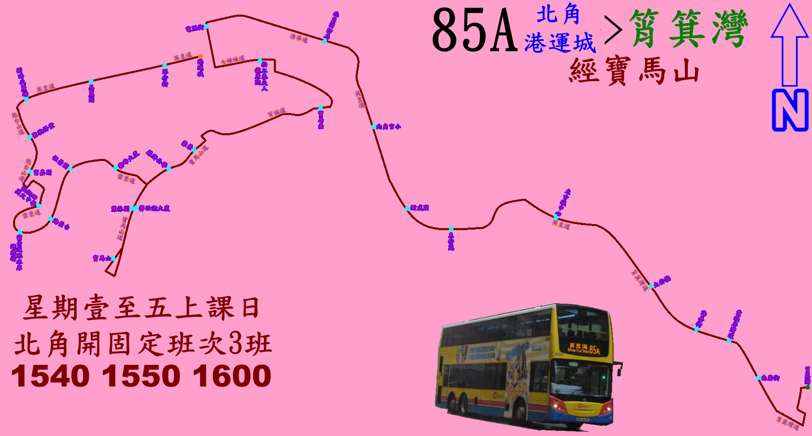 中文（香港）: 城巴85A線(小西灣方向)的走線圖